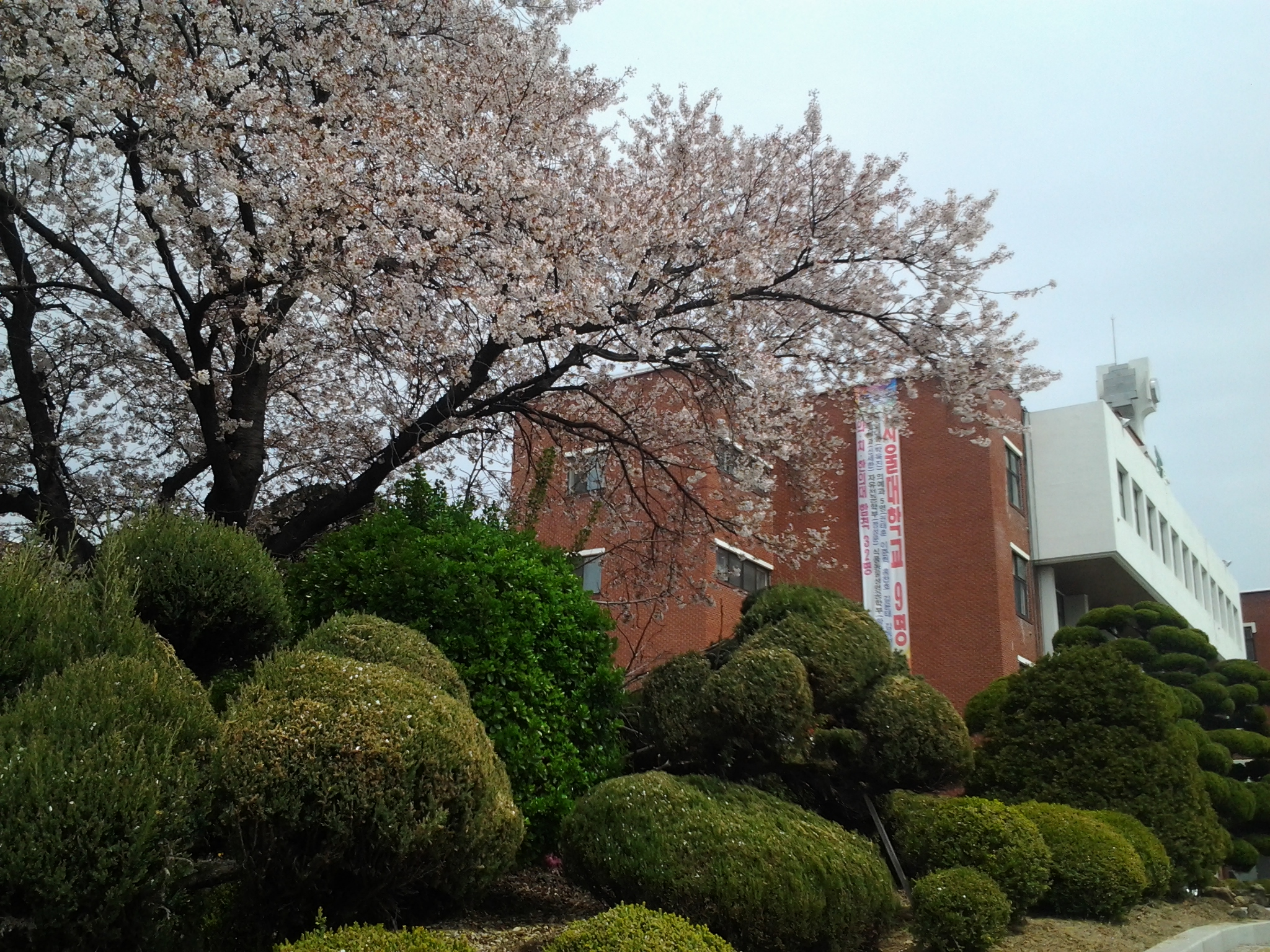 경북고 4월 벚꽃